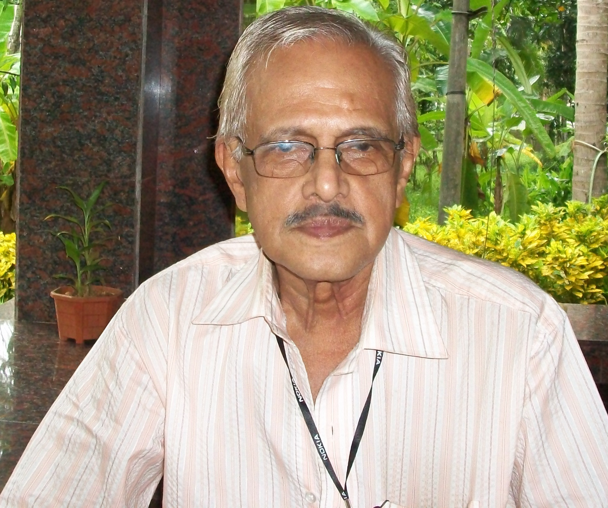 ചരിത്രപണ്ഡിതൻ ഡോ. എം. ഗംഗാധരൻ